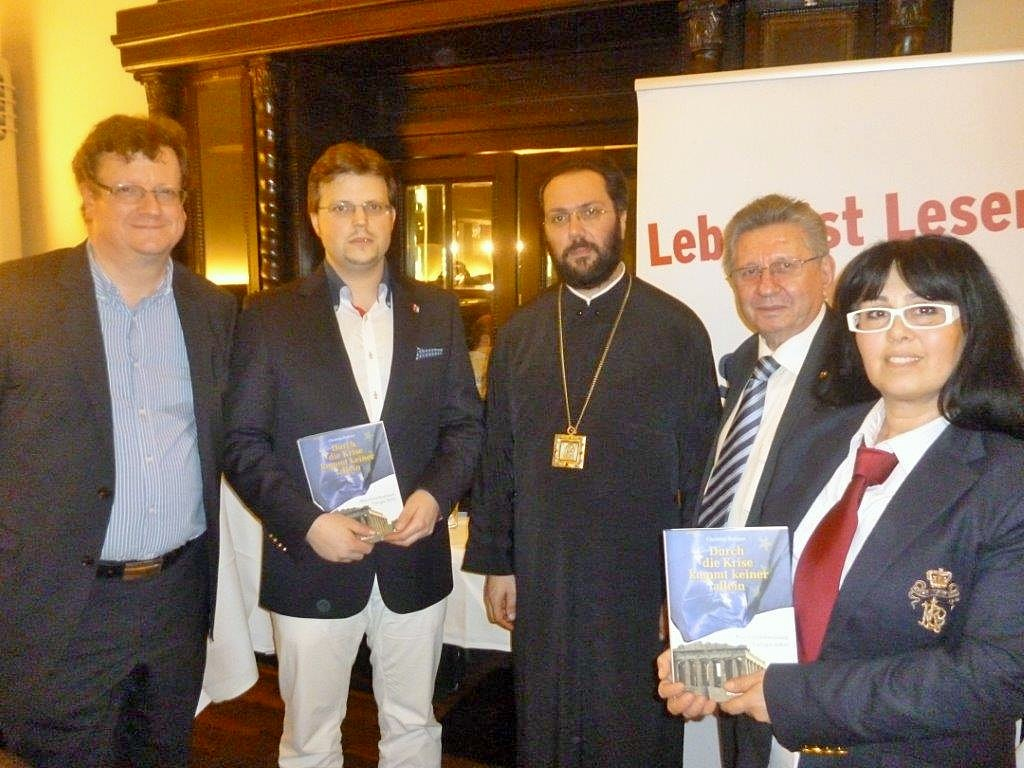 Buchpräsentation von ORF-Journalist und Redakteur Christian Rathner im Wiener "Orpheus": "Durch die Krise kommt keiner allein. Was Griechenland Europa lehrt". Personen von links nach rechts: ORF-Journalist und Redakteur Christian Rathner, Künstler Matthias Laurenz Gräff, Arsenios - griechisch-orthodoxer Metropolit von Austria und Exarch von Ungarn und Mitteleuropa, Charilaos Zikos - Präsident des interkulturellen Vereines Makedonien und Georgia Kazantzidu (Georgia Kazantzidou)